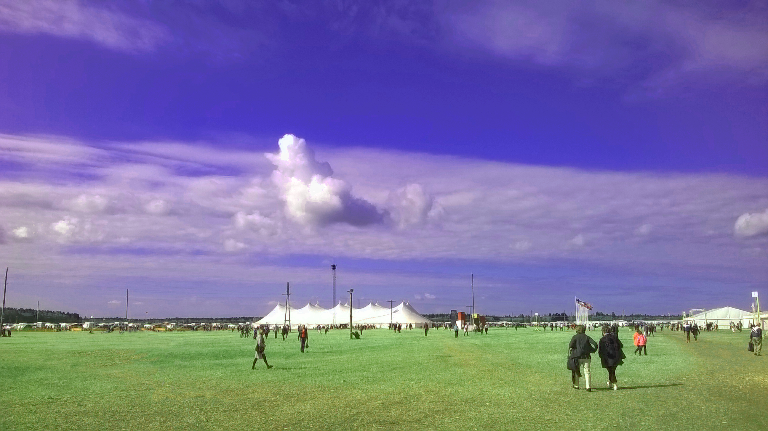 Suviseurat järjestetään usein peltoaukealla